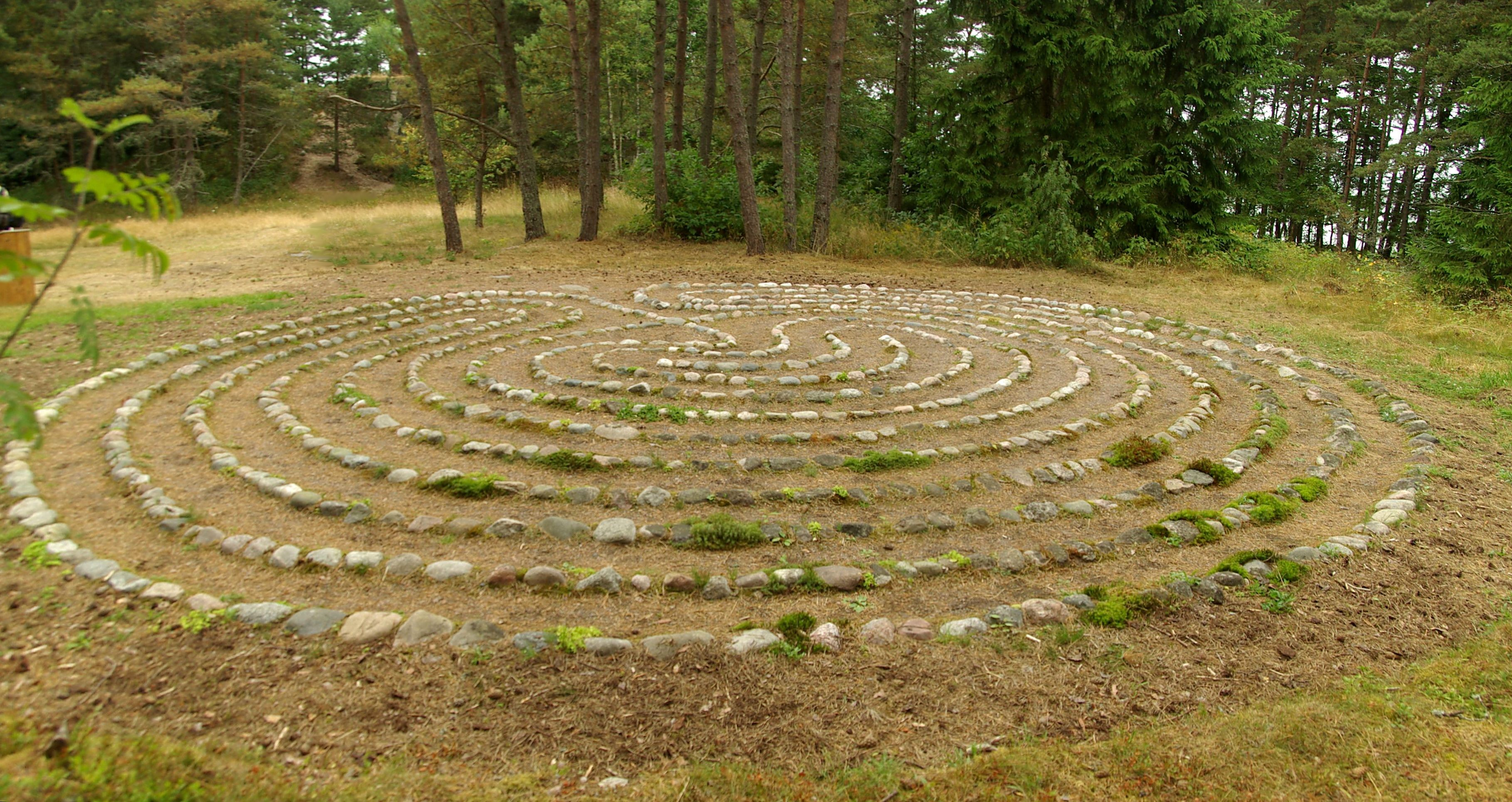 Labürint asub Aegna saarel,Eerikneeme tipus